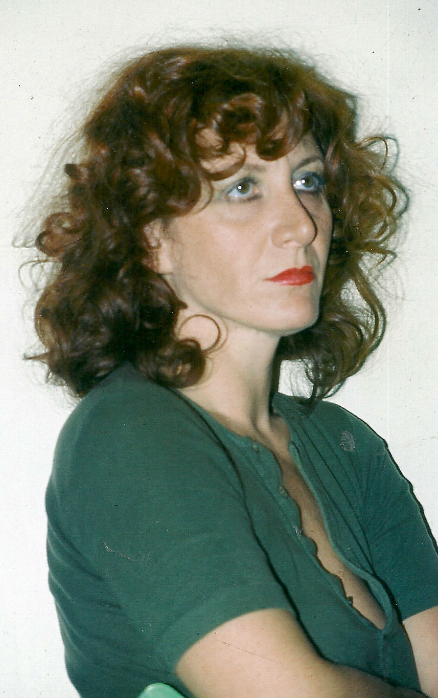 Laura Schrader, 29 giugno 1973